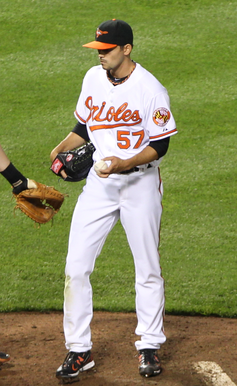 Clay Rapada